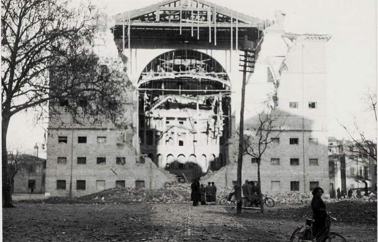 Il Teatro A. Galli di Rimini dopo i bombardamenti del 43-44